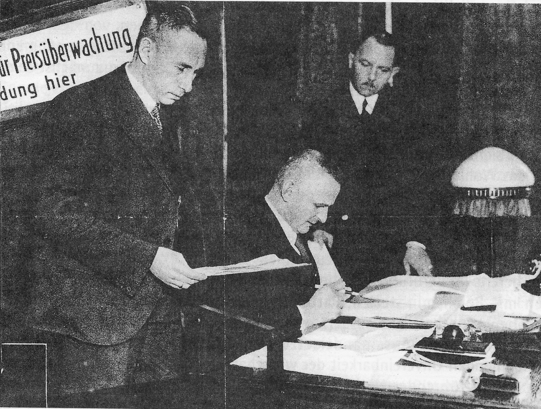 Carl Friedrich Goerdeler als Preiskommisar.